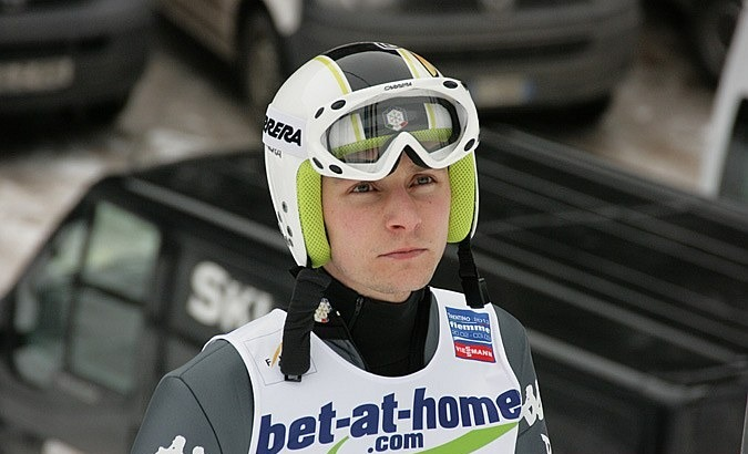 Sebastian Colloredo podczas konkursu indywidualnego mężczyzn na skoczni normalnej w ramach Mistrzostw Świata 2013.